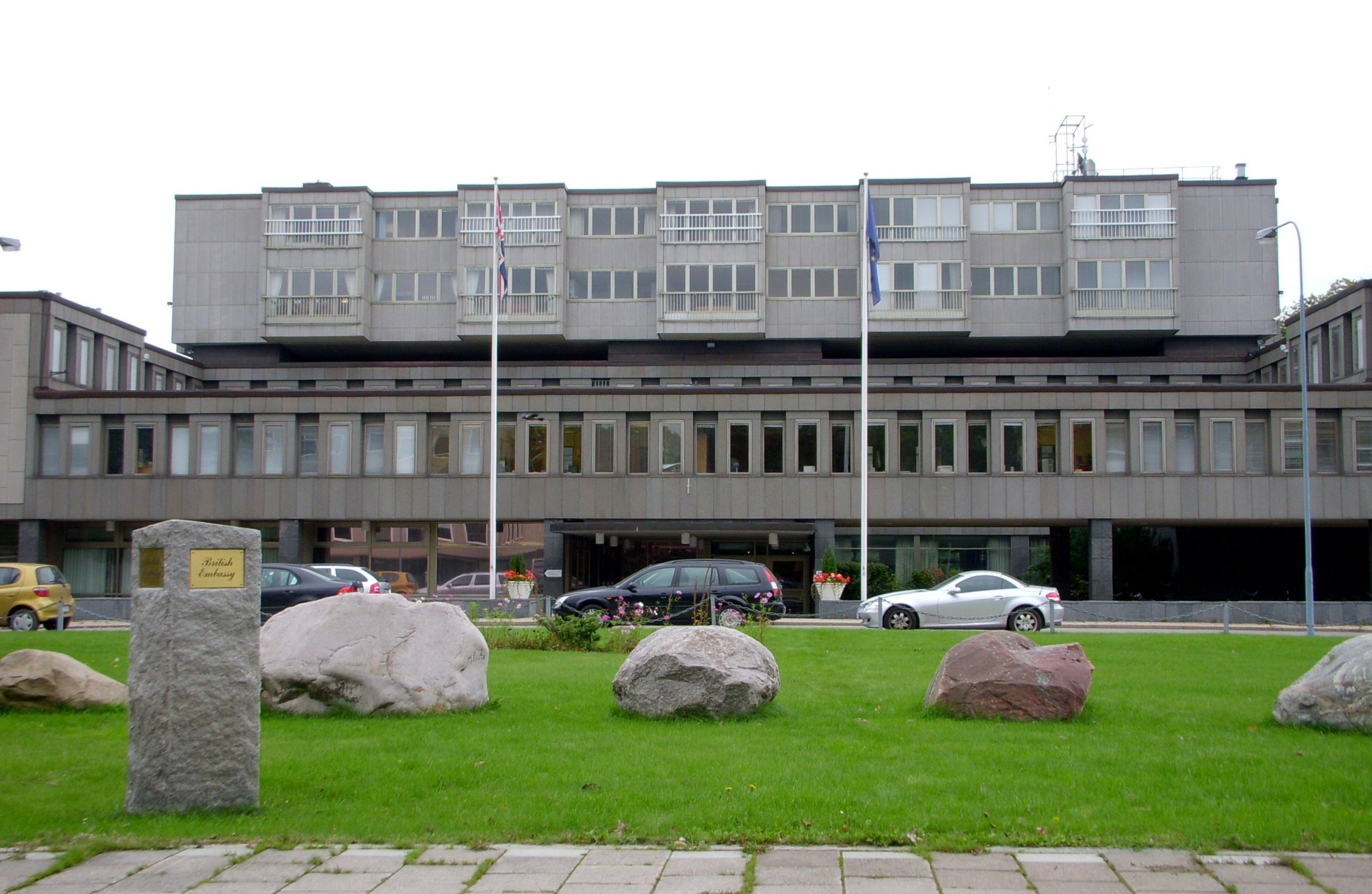 Storbritanniens ambassad i Stockholm